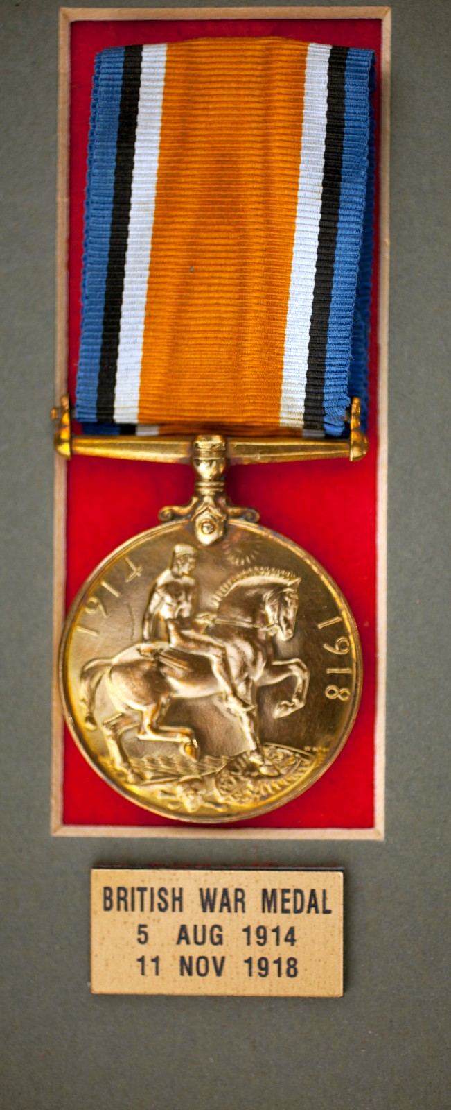 O Γαβριήλ Χατζησάββας γεννήθηκε το 1890 στην Πάνω Δευτερά της επαρχίας Λευκωσίας. Σύζυγος του ήταν η Χριστοθέα Χατζησάββα του γένους Χατζήνικολή από το Αγριδάκι. Με την Χτιστοθέα απέκτησαν την Βασιλική (απεβίωσε), Νίκη (απεβίωσε), Γεωργία, Ανδρέα (απεβίωσε), και Ελένη Κέντα (απεβίωσε) Κατετάγη σε ηλικία 24 χρονών ως ημιονηγός στο Σώμα Ημιονηγών (MMC 11424) και υπηρέτησε στο Μακεδονικό Μέτωπο κατά τα έτη 1914-1918. Όταν κατετάγη στο στρατό ήταν ήδη παντρεμένος με κοπέλα από το Αρεδιου και απέκτησε 1 παιδί, την Ελένη Κέντα, η οποία έμενε στην Κάτω Ζώδια. Η πρώτη του σύζυγος απεβίωσε και έτσι παντρεύτηκε τη Χριστοθέα Ηλία από το Αγριδάκι και κατοίκησαν στον Άγιο Δομέτιο, στην οδό Ανδρούτσου 3. Από τη δεύτερη σύζυγο απέκτησε 4 παιδιά. Το επάγγελμά του ήταν βοσκός και κατήχε "Άδεια Βοσκής" από την Αγγλική Κυβέρνηση με μεταλικό διακριτικό για το βραχίωνα με το σήμα "S" και αριθμό N 505 (το "N" συμβολίζει την Επαρχία, δηλαδή Nicosia - Λευκωσία).